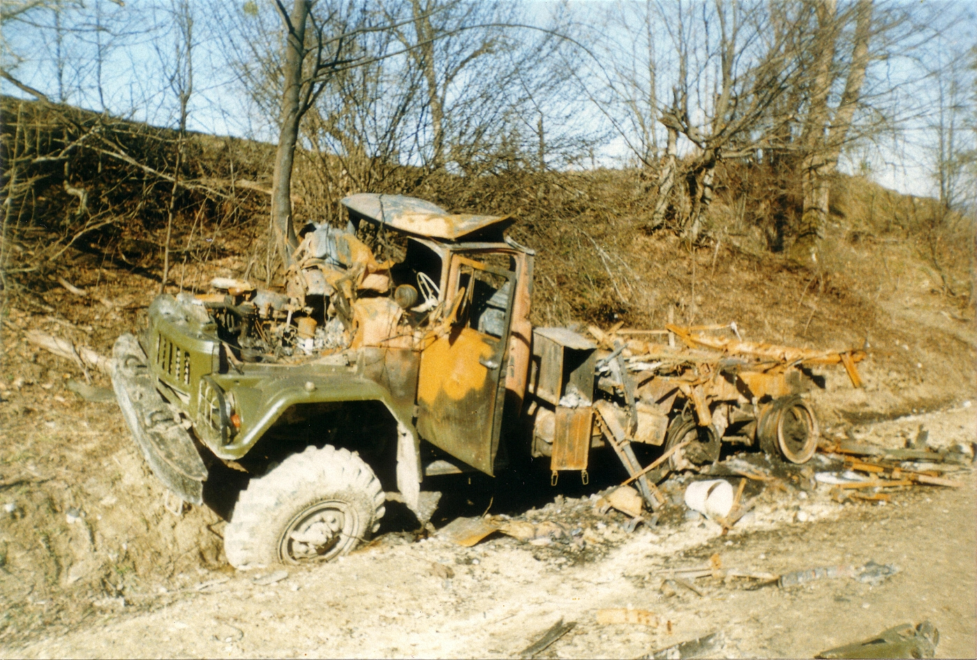 После боя. Подбитый боевиками ЗиЛ-131.